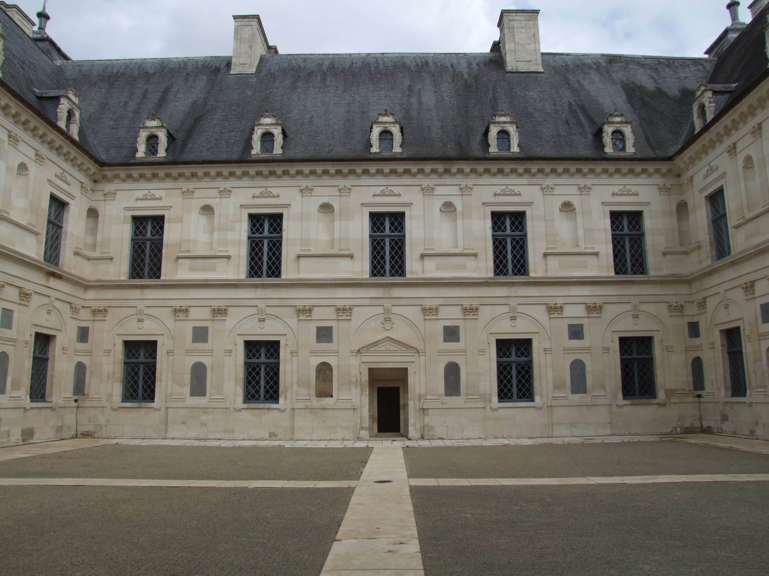 Château d'Ancy-le-Franc, Yonne, Bourgogne, FRANCE